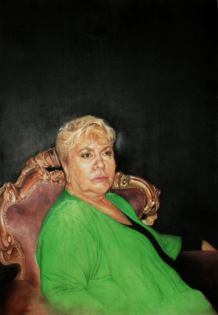 דיוקן תיקי דיין